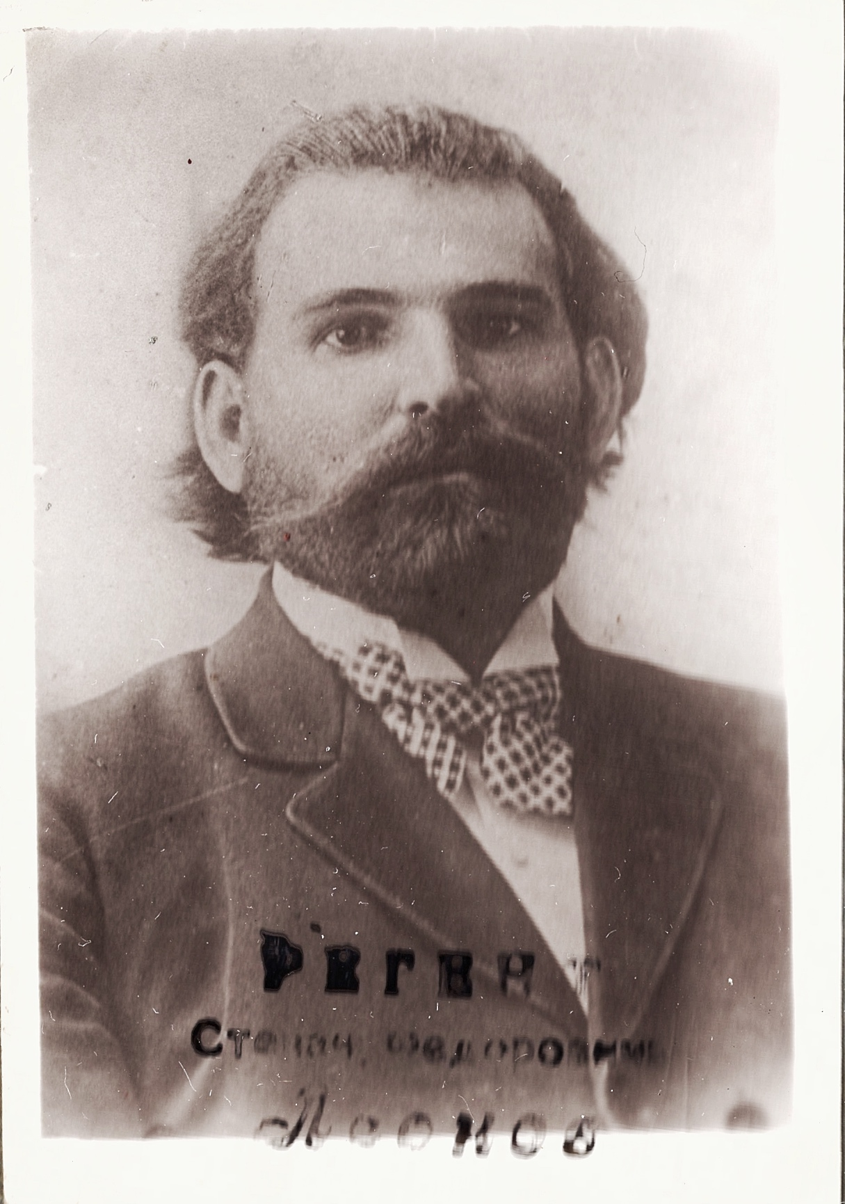 Фотография регента Троицкого собора Моршанска Степана Фёдоровича Леонова с именной печатью, сделанная предположительно в начале XX века в Моршанске.